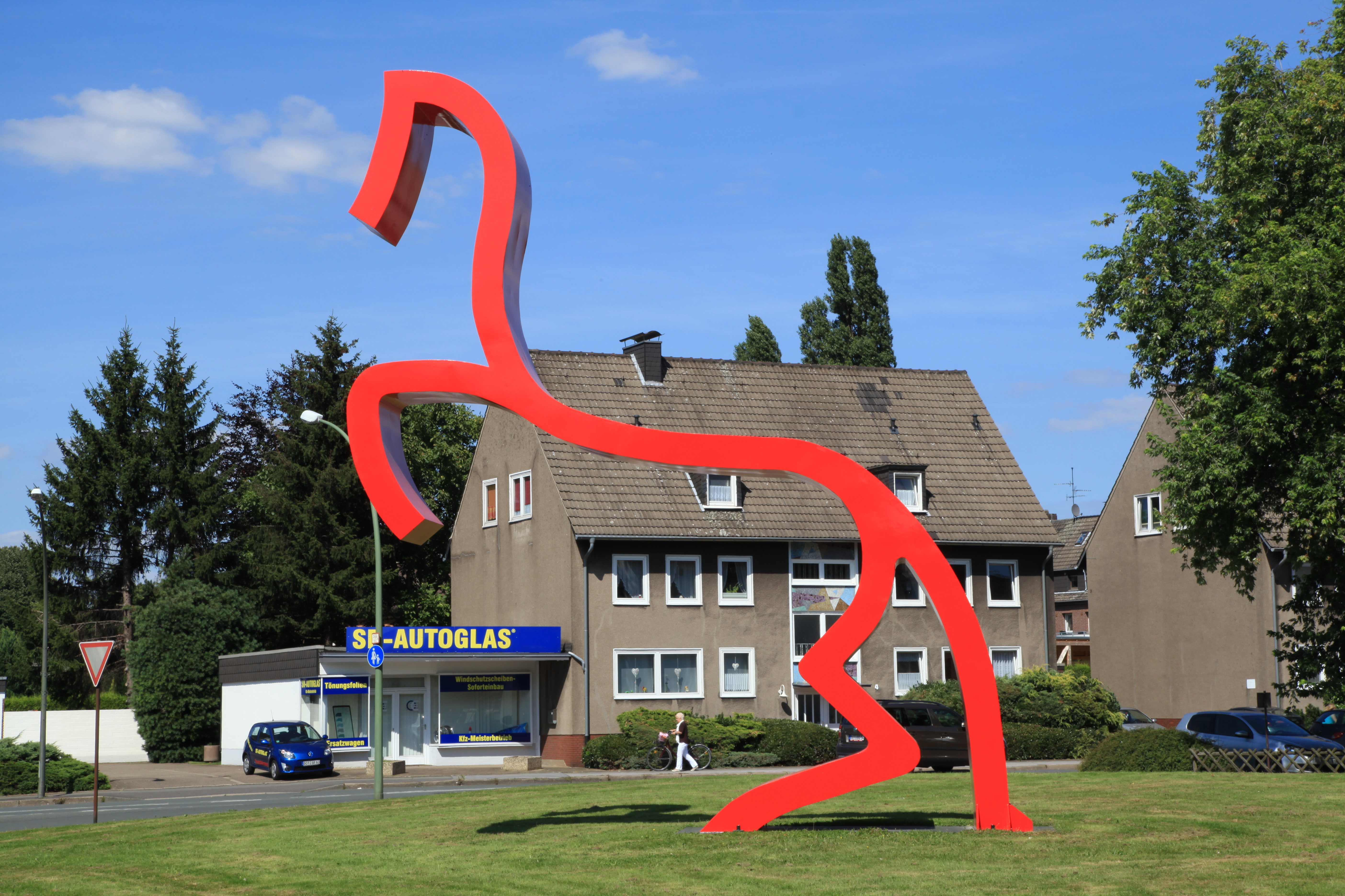 Rotes Pferd von Johann Hinger an der Kirchhellener Straße (Ecke Schubertstraße) in Bottrop